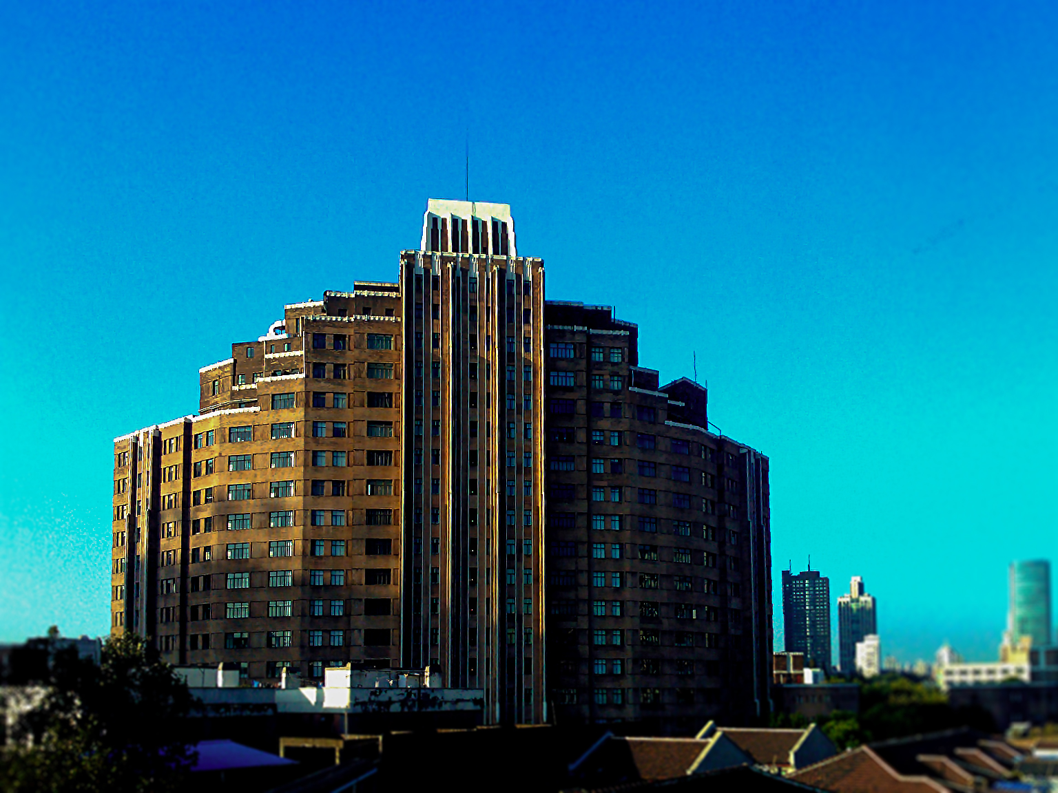 中文（中国大陆）: 峻岭公寓(现锦江饭店锦北楼）